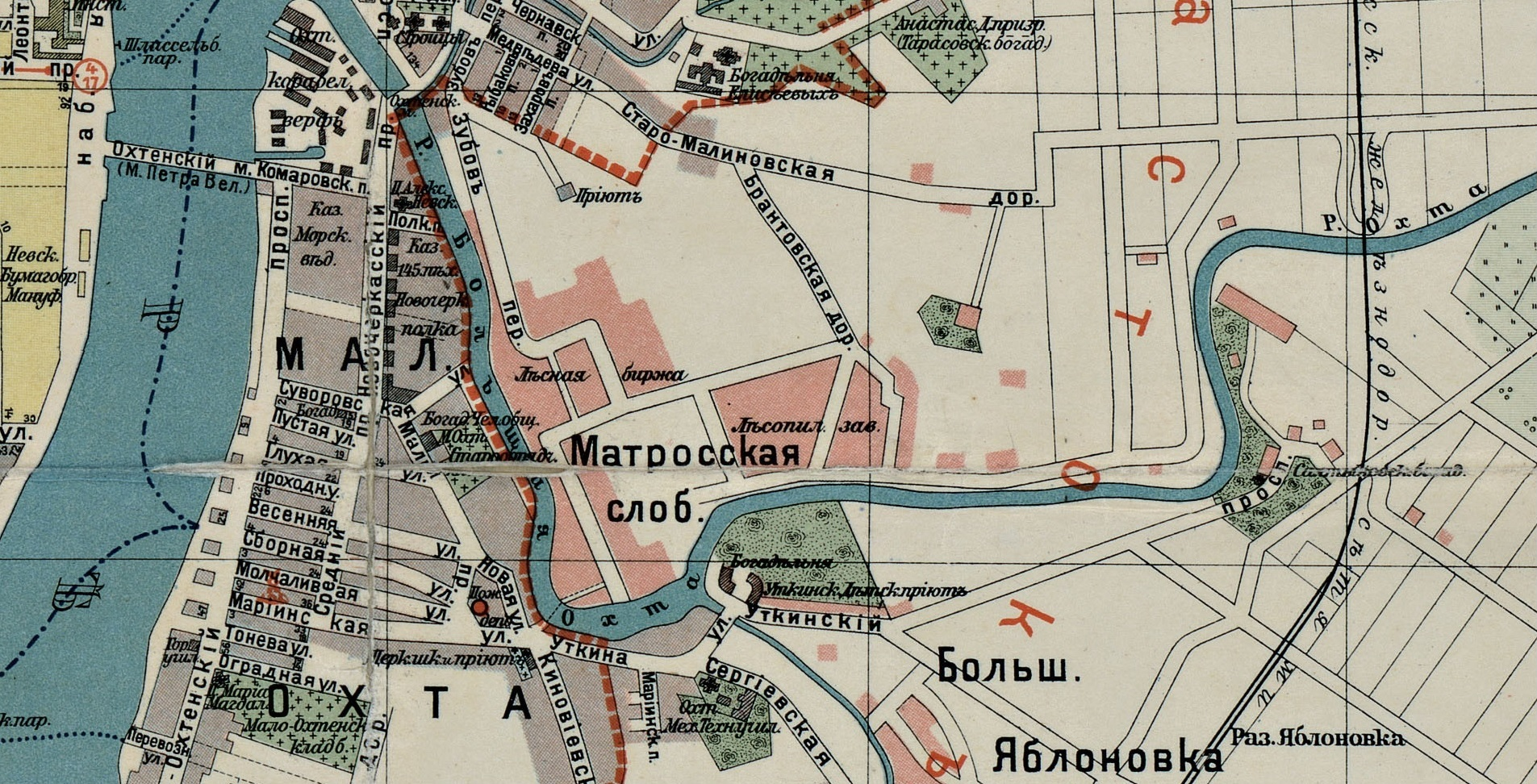 Карта Малой Охты 1914 год